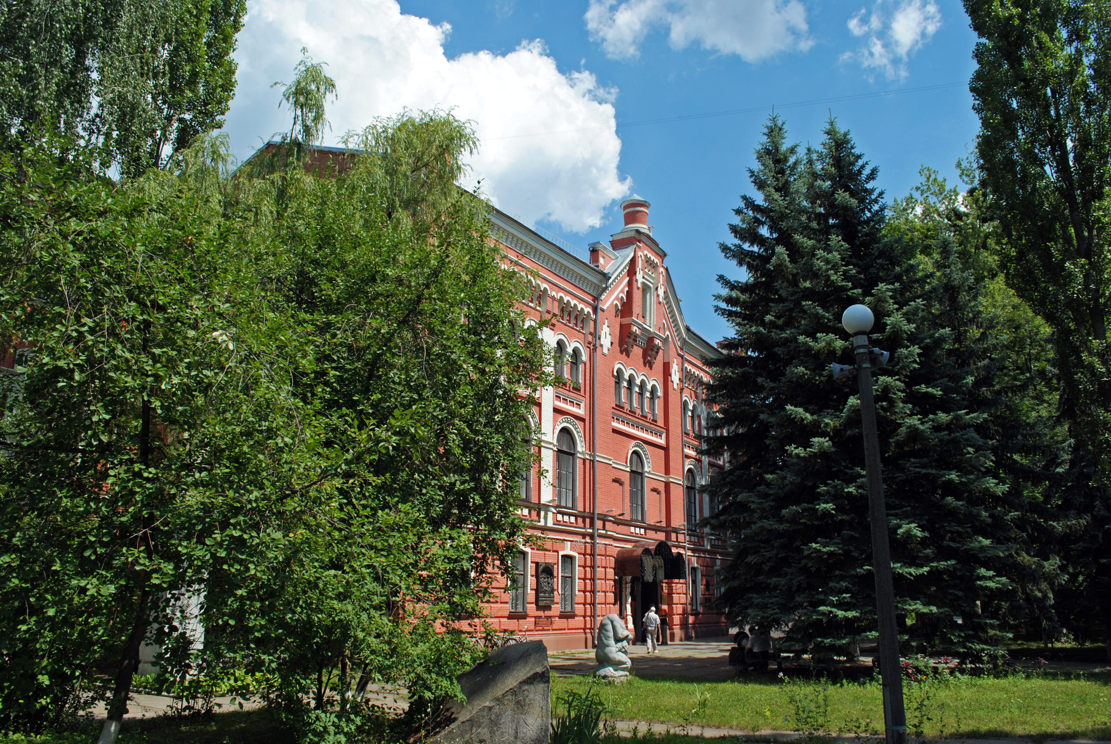 Семінарія київська духовна, Київ, Смирнова-Ласточкіна вул., 20